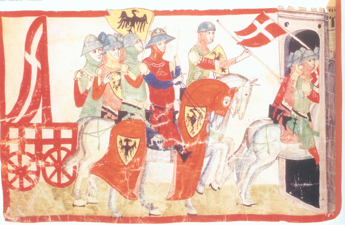 Die Abbildung Giovanni Villanis zeigt die Erbeutung des Mailander Carroccios nach der Schlacht von Cortenuova 1237.